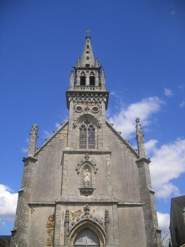 Façade de la chapelle Notre-Dame de Lourdes d'Auray (1868-1872), dans le quartier de Saint-Goustan